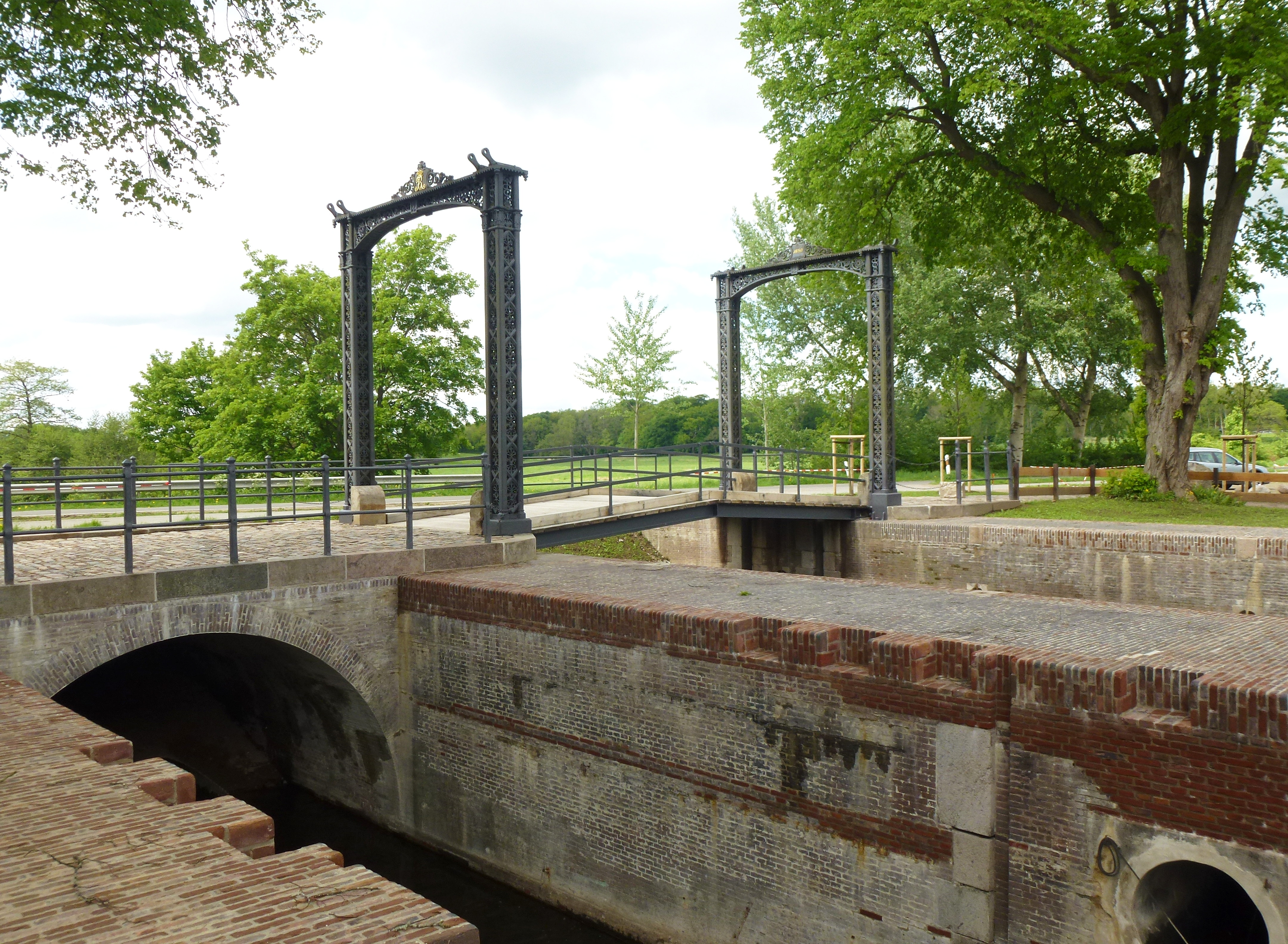 Kluvensieker Schleuse alter Eiderkanal